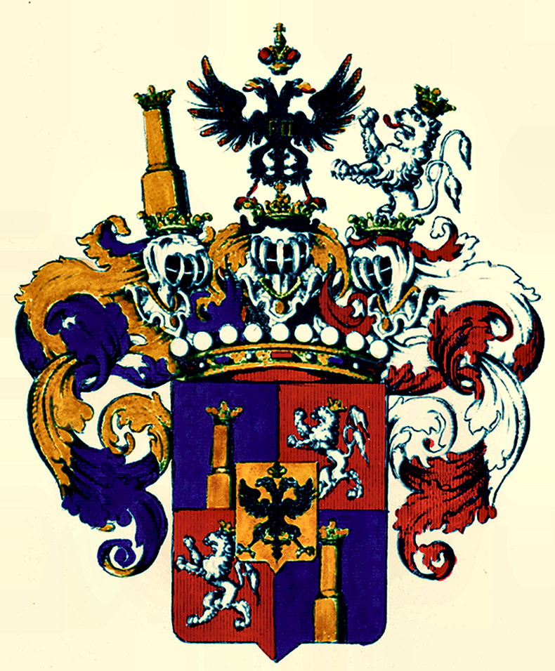 Wappen der Grafen von Goess nach Tyroff, erstmalig 1693